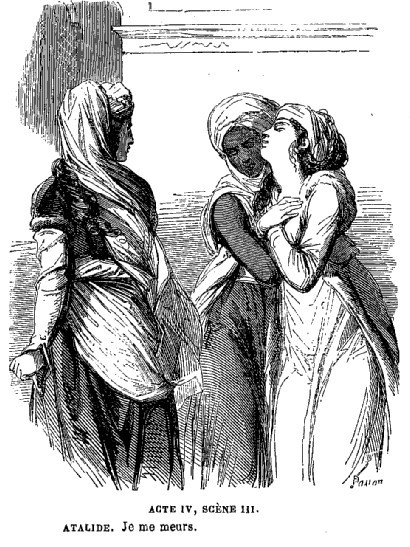 Illustration par Pauquet de la tragédie Bajazet de Racine, dans le Panthéon populaire illustré, 2e série, 1851